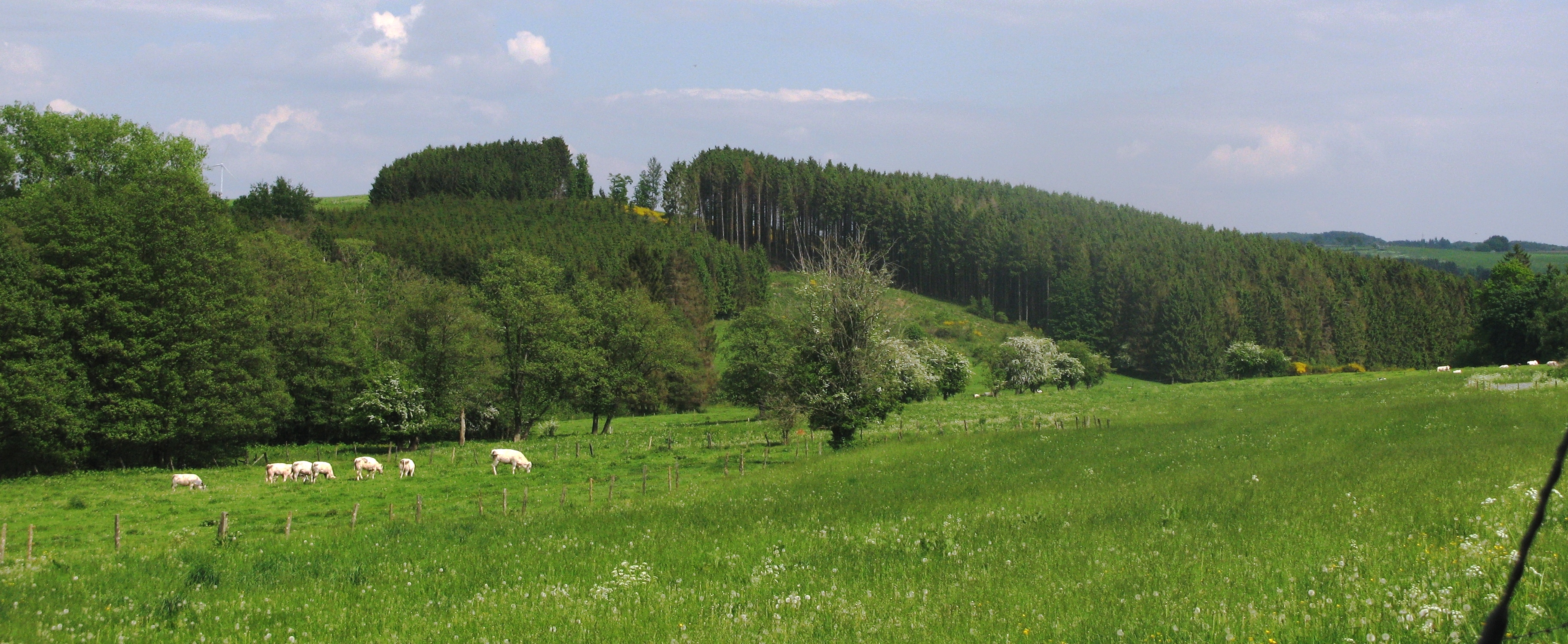 Den Dall vun der Lingserbaach bei Longvilly. Kategorie:Baachen an der Belsch